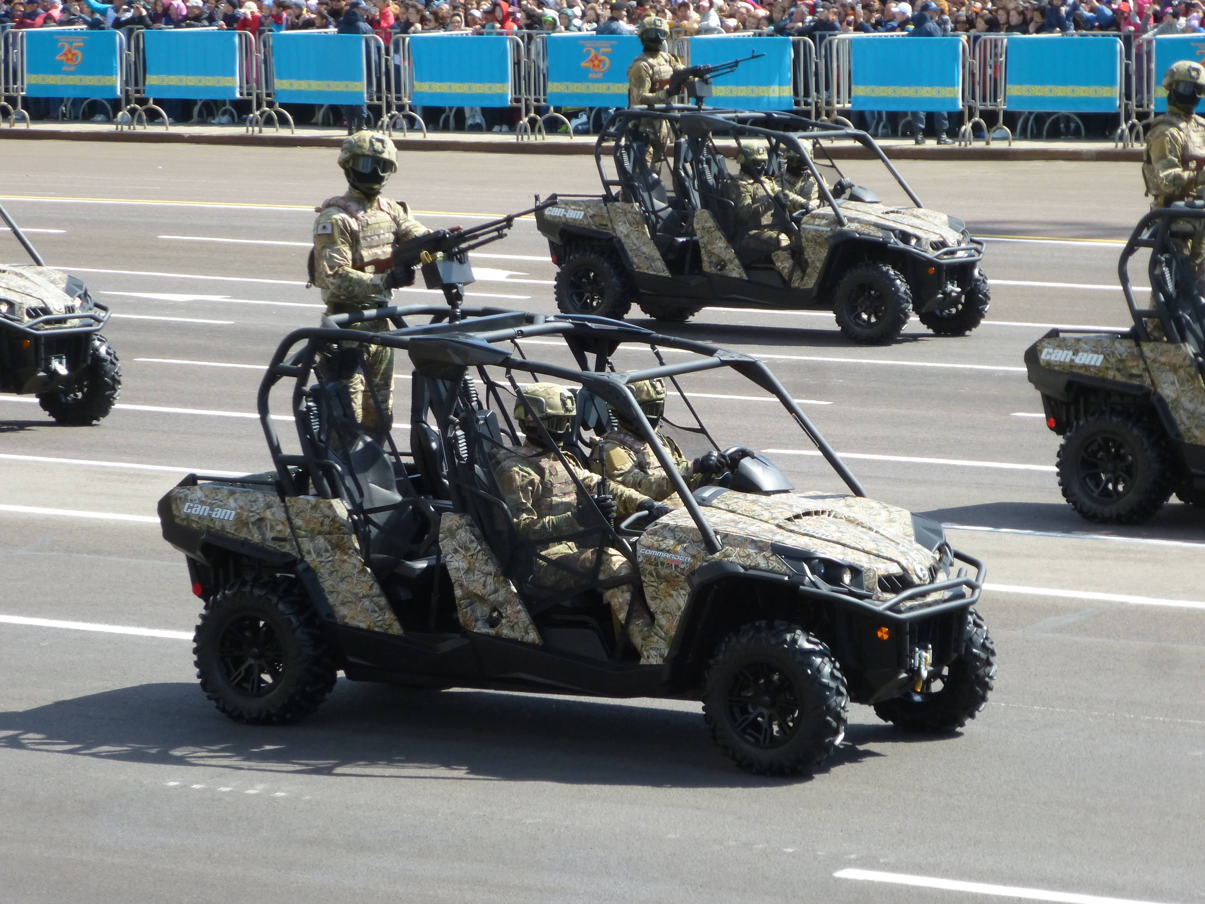 Багги в казахстанской армии производства канадской фирмы Can Am